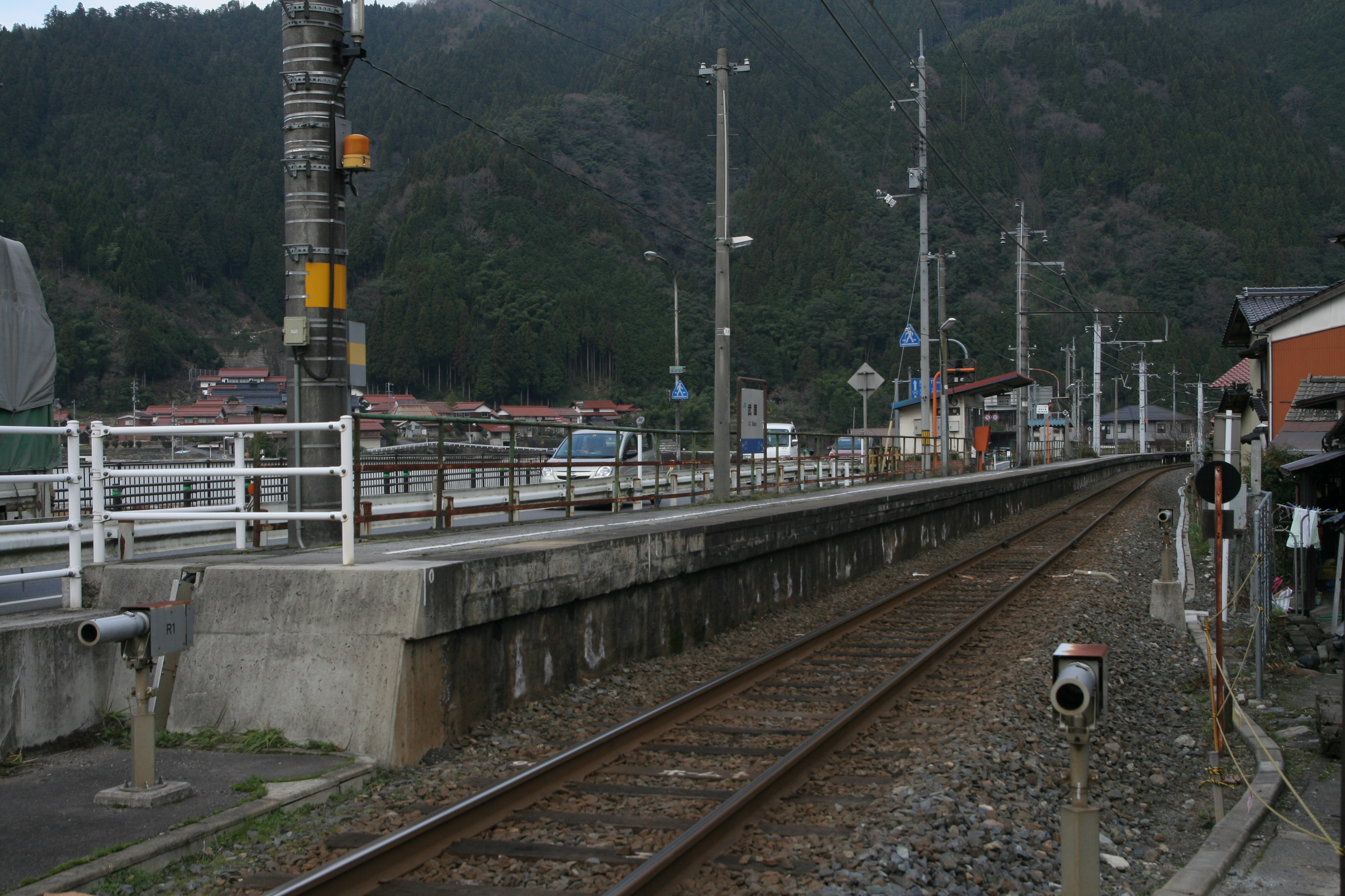 JR西日本 伯備線、武庫駅の構内の様子